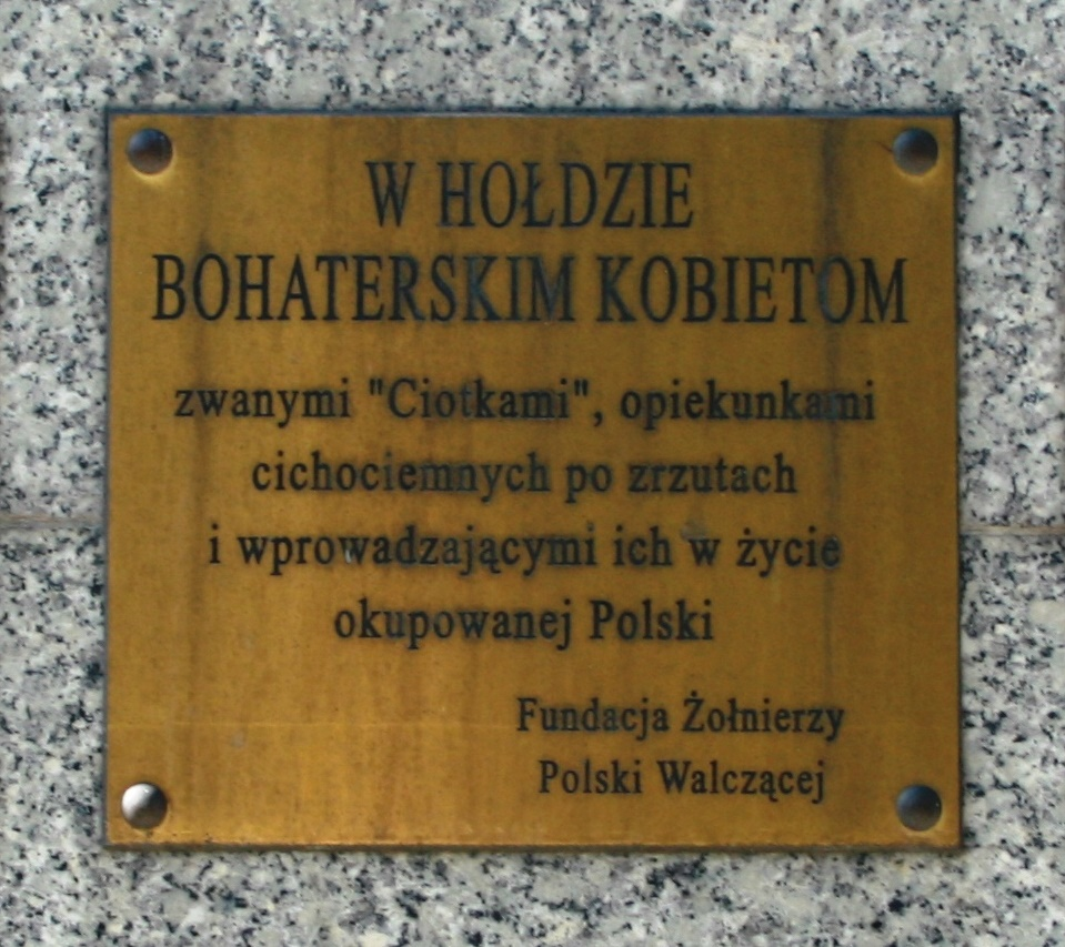 Tablica poświęcona "ciotkom" cichociemnych w kwaterze Panteon Żołnierzy Polski Walczącej - Macte Aniomo na Cmentarzu Wojskowym w Warszawie